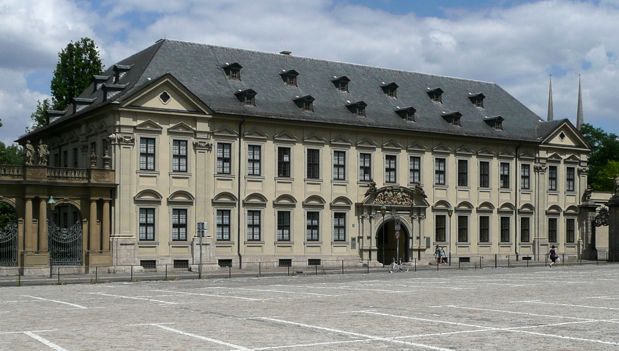 RosenbachpalaisThis is a photograph of an architectural monument.